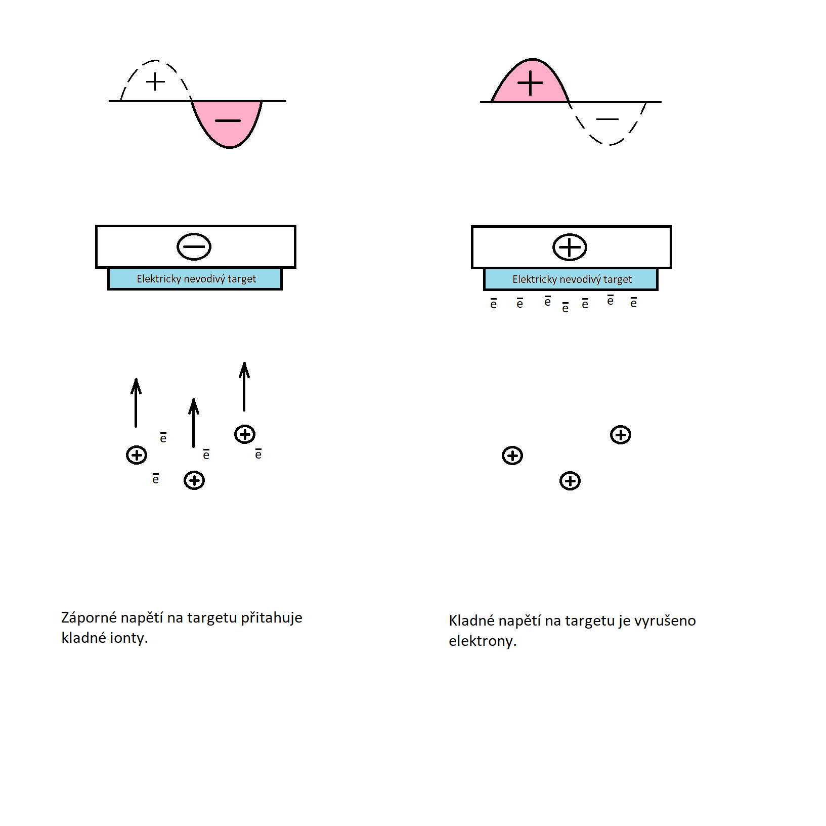 Je-li target záporně nabitý, ionty jsou k němu přitahovány. Je-li target kladně nabitý, jeho potenciál je odstíněn elektrony.